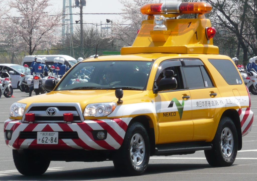 E-Nexco road patrol car.